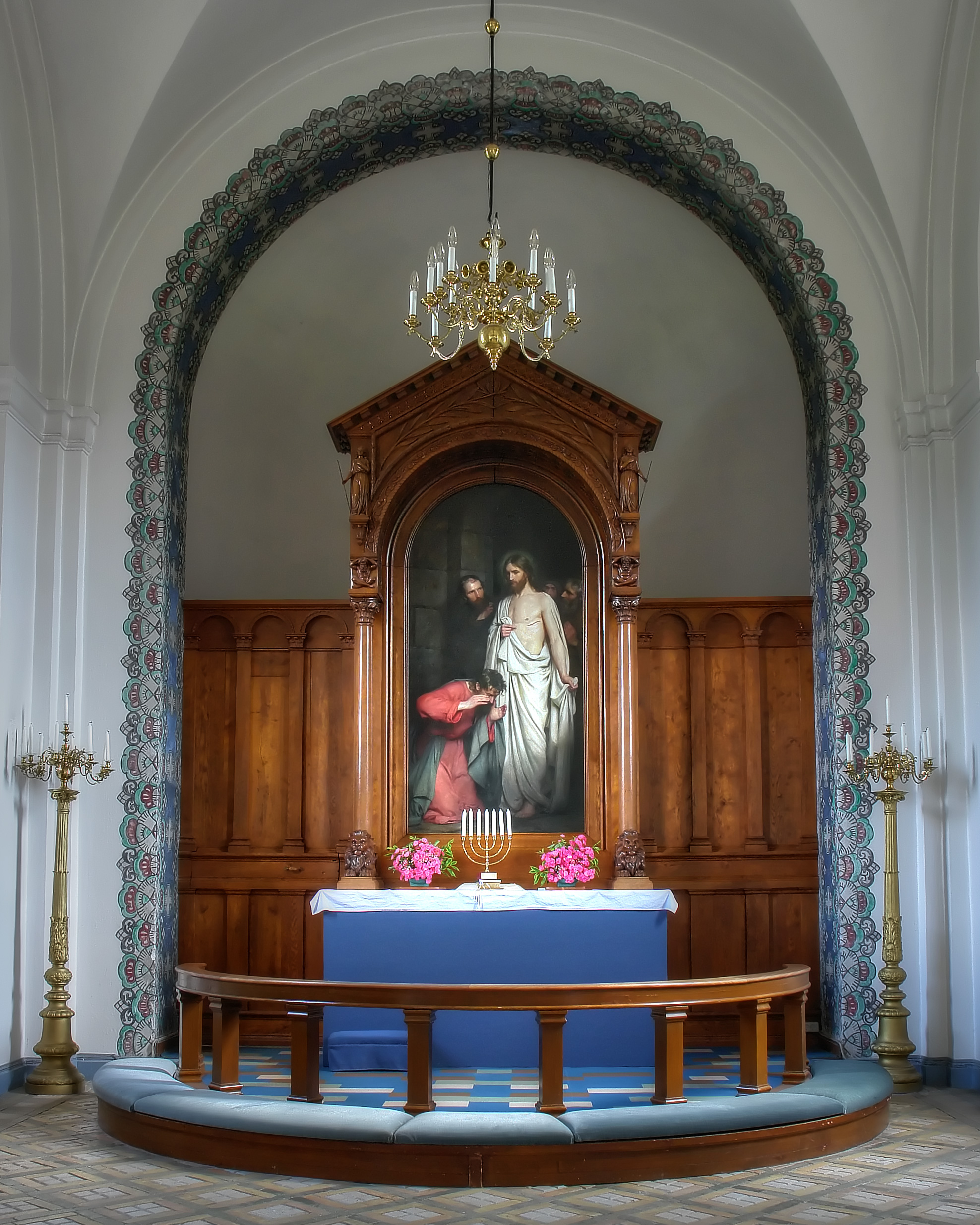 Kirche von Ugerløse, Dänemark (West-Seeland). Das Altarbild mit dem Motiv des „Ungläubigen Thomas“ malte Carl Bloch 1881